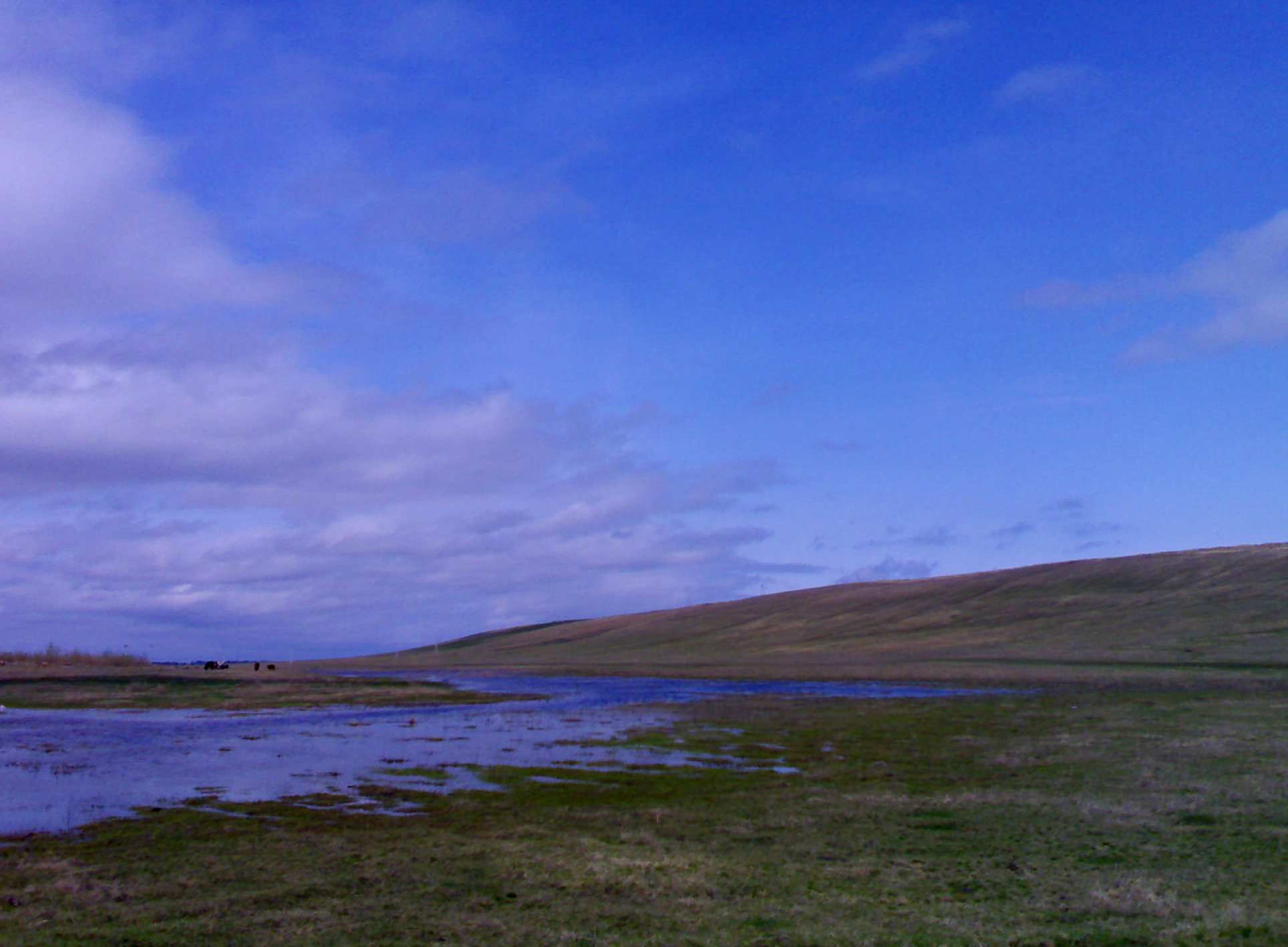 Холмы рядом с селом Афонькино